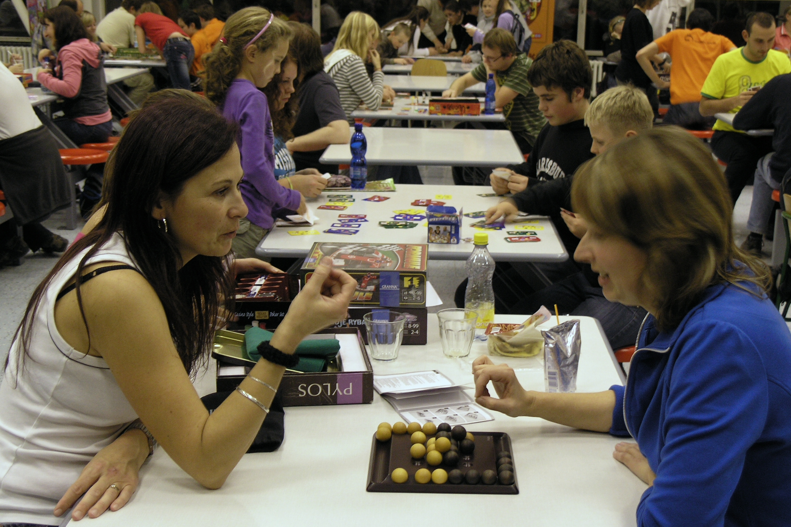 Herní festival Goliáš a David 2009 v Nepomuku Personality rights warning Although this work is freely licensed or in the public domain, the person(s) shown may have rights that legally restrict certain re-uses unless those depicted consent to such uses. In these cases, a model release or other evidence of consent could protect you from infringement claims.